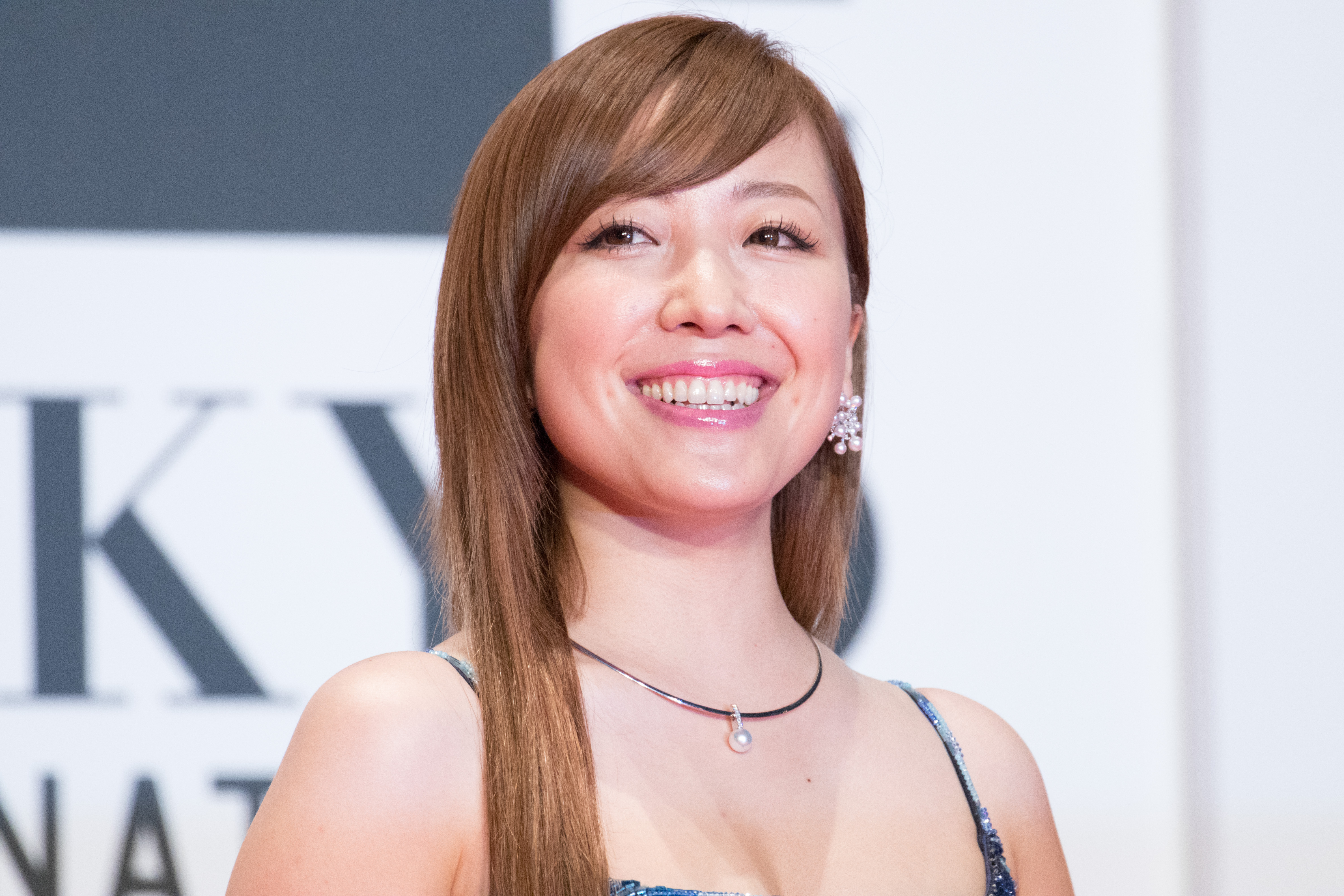 第29回 東京国際映画祭 オープニングセレモニー 平原綾香 (マイ・ベスト・フレンド)